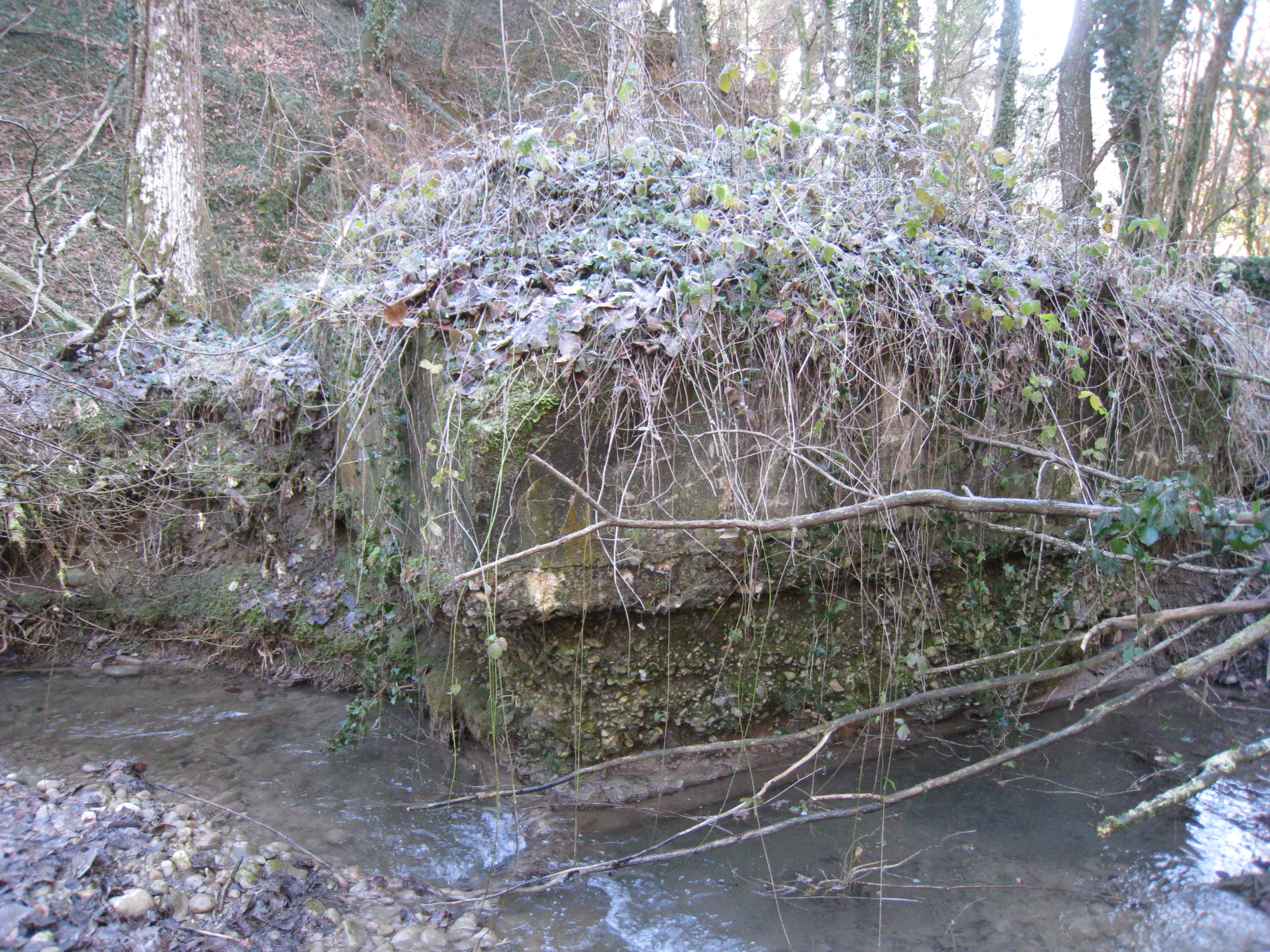 zeezeze